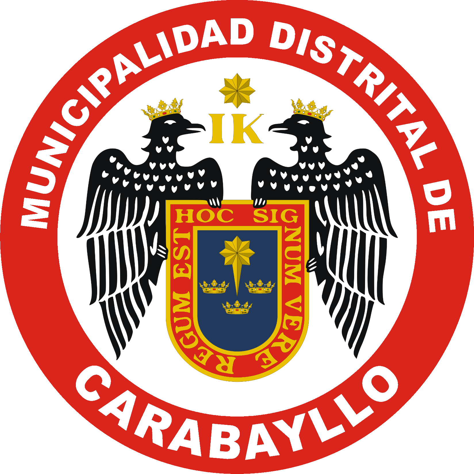 Carabayllo, Lima